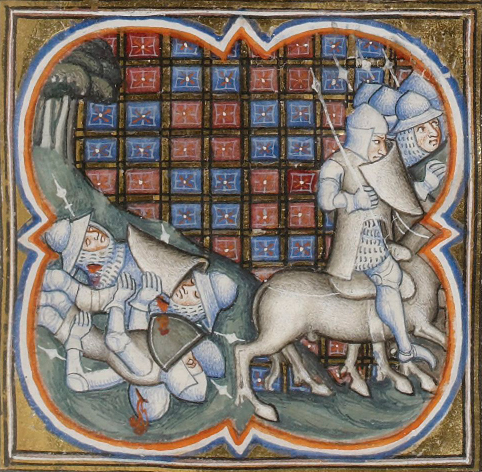 L'armée quittant le champ de bataille de Bouvines. Enluminure des Grandes Chroniques de France de Charles V, XIVe siècle, Paris, Bibliothèque nationale de France, Département des manuscrits, Français 2813, folio 256 recto.